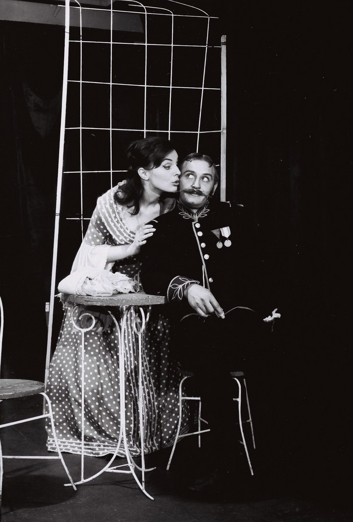 Anton Medved, Rendez-vous, Akademija za gledališče, radio, film in televizijo. Na fotografiji: Anka Zupanc (Berta) in Dare Valič (Lokar).